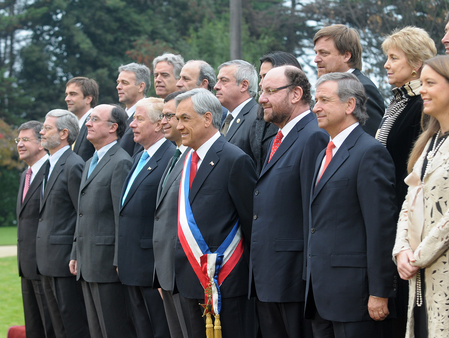 El Presidente de la República, Sebastián Piñera, participó en la Fotografía Oficial junto a su gabinete ministerial